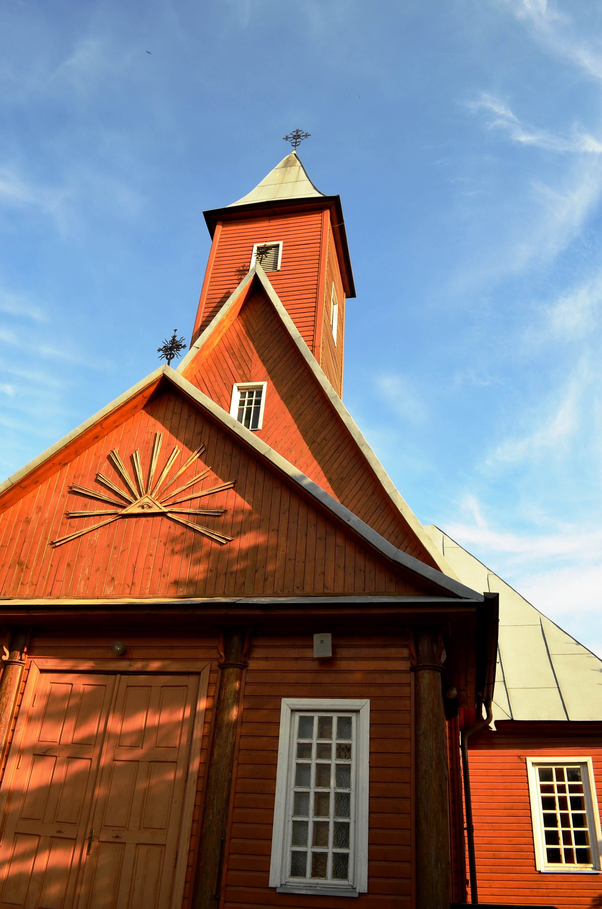 Varėnos Šv. Arkangelo Mykolo bažnyčia